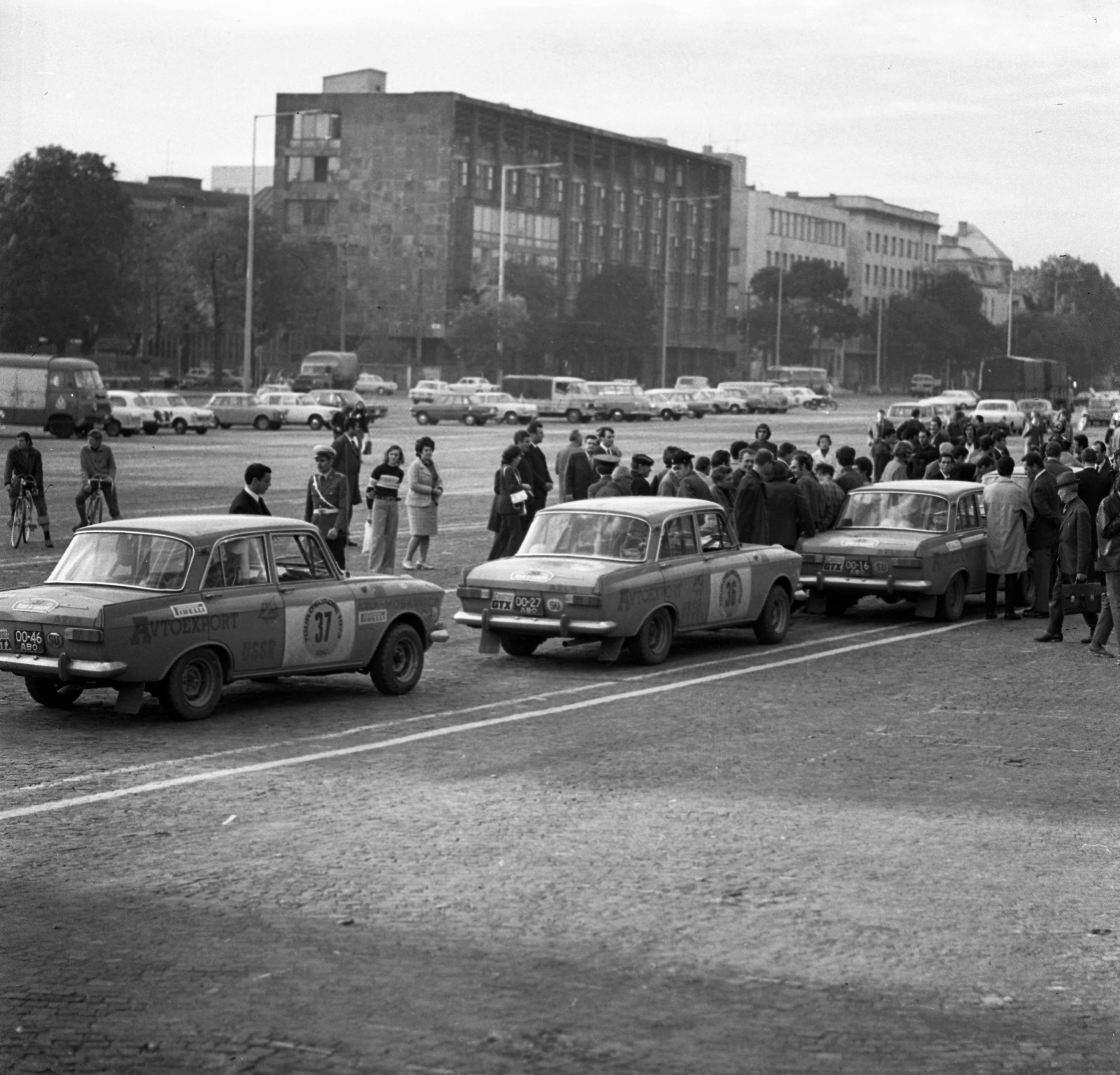 Ötvenhatosok tere (Felvonulási tér), ADAC Tour d' Europe rallye futam állomása. 36 rajtszámmal az Arnold Dambis - Andris Swingevith szovjet páros, 37 rajtszámmal a Nikolai Kirpitschnikow - Alexandr Safonov szovjet páros, Moszkvics 412 típusú versenyautóikkal. Location: Hungary, Budapest XIV. Tags: Budapest Title: Ötvenhatosok tere (Felvonulási tér), ADAC Tour d' Europe rallye futam állomása. 36 rajtszámmal az Arnold Dambis - Andris Swingevith szovjet páros, 37 rajtszámmal a Nikolai Kirpitschnikow - Alexandr Safonov szovjet páros, Moszkvics 412 típusú versenyautóikkal.